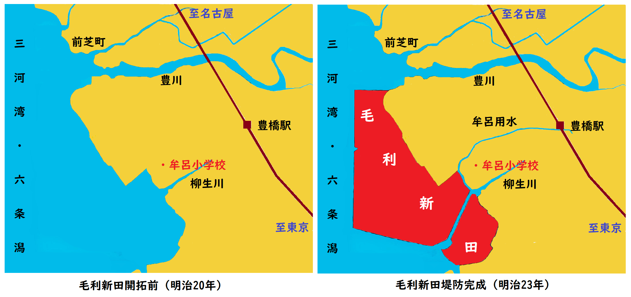 毛利新田の位置と大きさが開発前後でどう変わったのかを表してます。